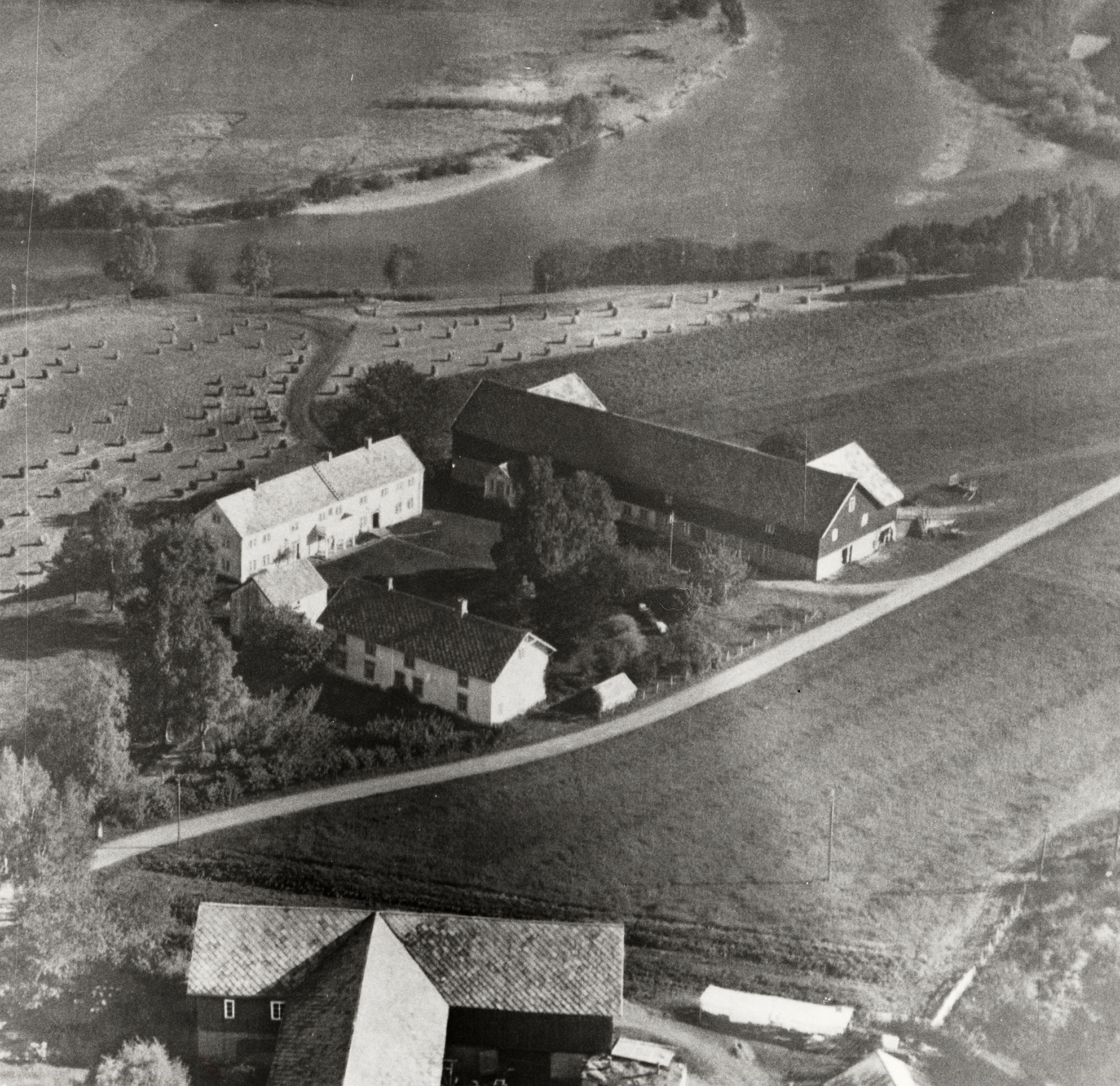 Ingstad Østre i Hegra, Nord-Trøndelag Oversikt This image on crowdsourcing geotagging platform Fotodugnad